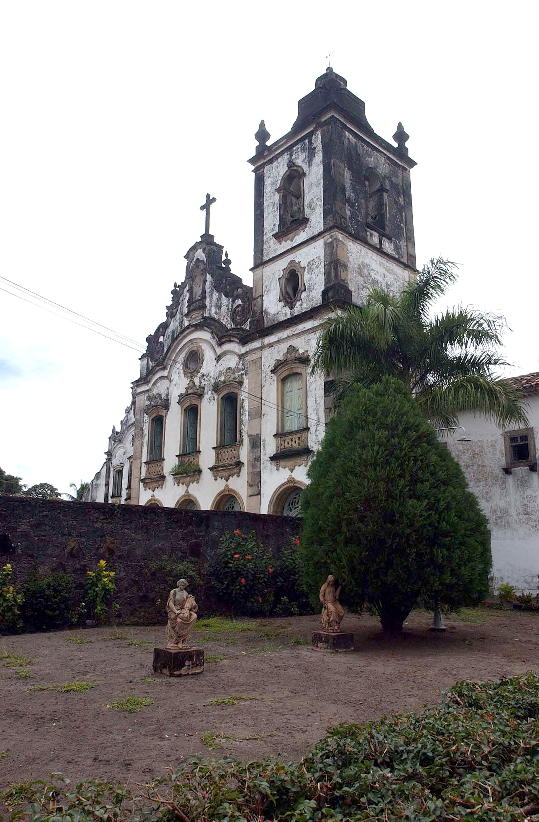 Convento de Santa Maria, município de Marechal Deodoro, Alagoas